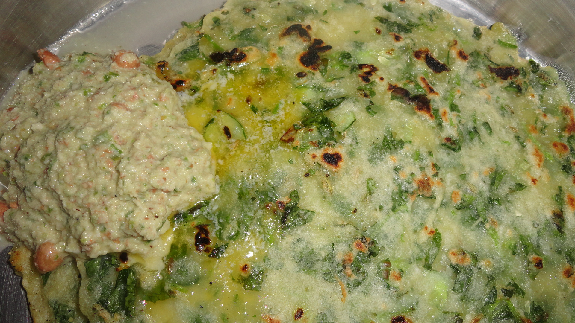 ಕನ್ನಡ: ಅಕ್ಕಿ ರೊಟ್ಟಿ ಜತೆ ತುಪ್ಪ ಮತ್ತು ಶೇಂಗಾ ತೆಂಗಿನಕಾಯಿ ಚಟ್ನಿಕನ್ನಡ: Akki Rotti